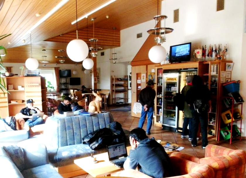 Blick in den Aufenthalsraum